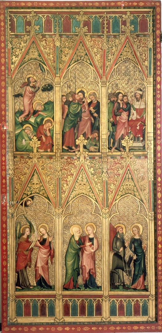 Ouverture des fêtes Volet extérieur gauche, intérieur